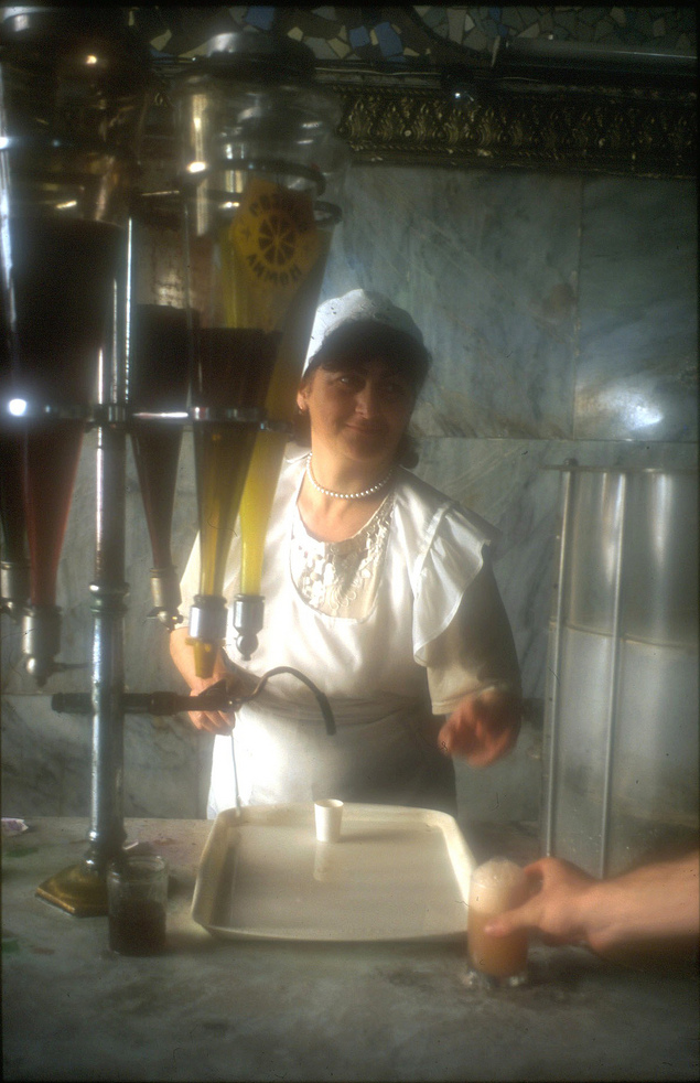 Lagidze water